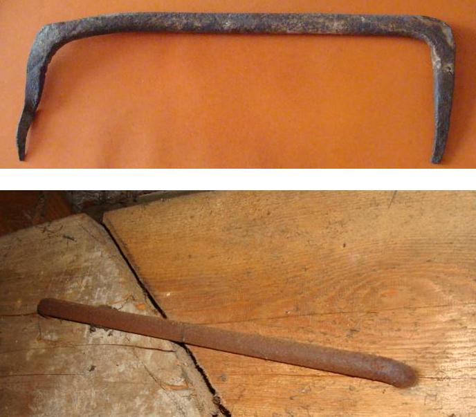 Claveaux ou valet de charpentier (crampons)